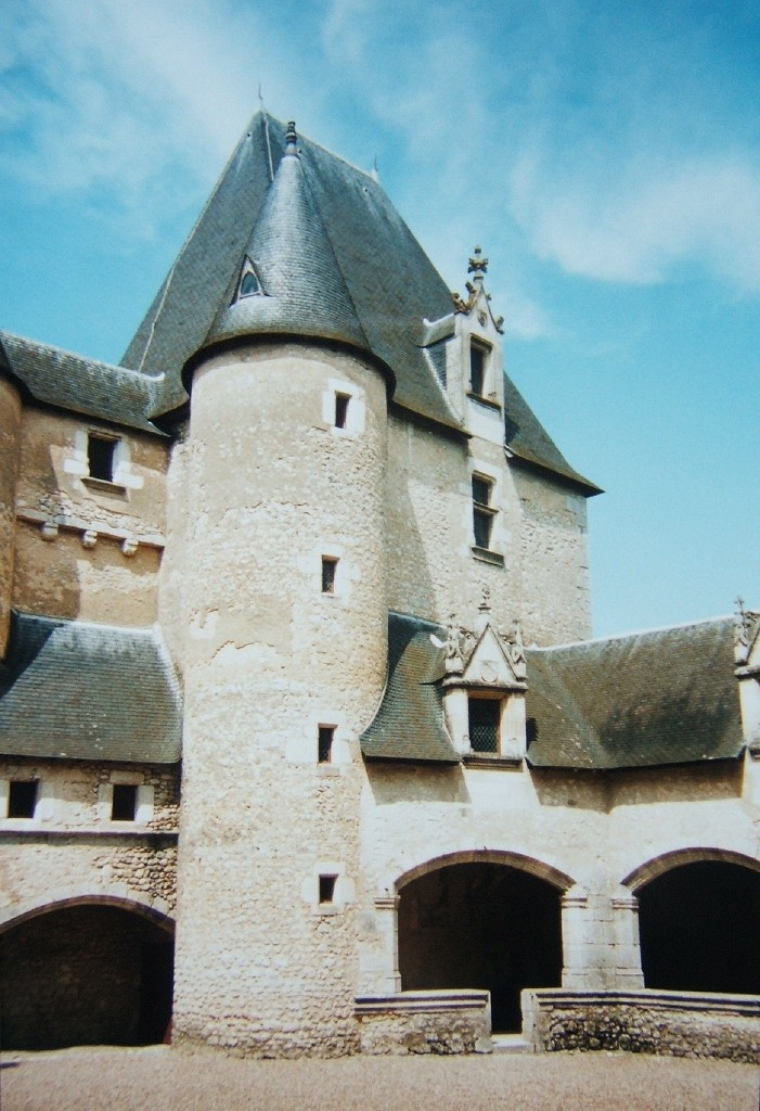 Château de Fougères-sur-Bièvre (France)